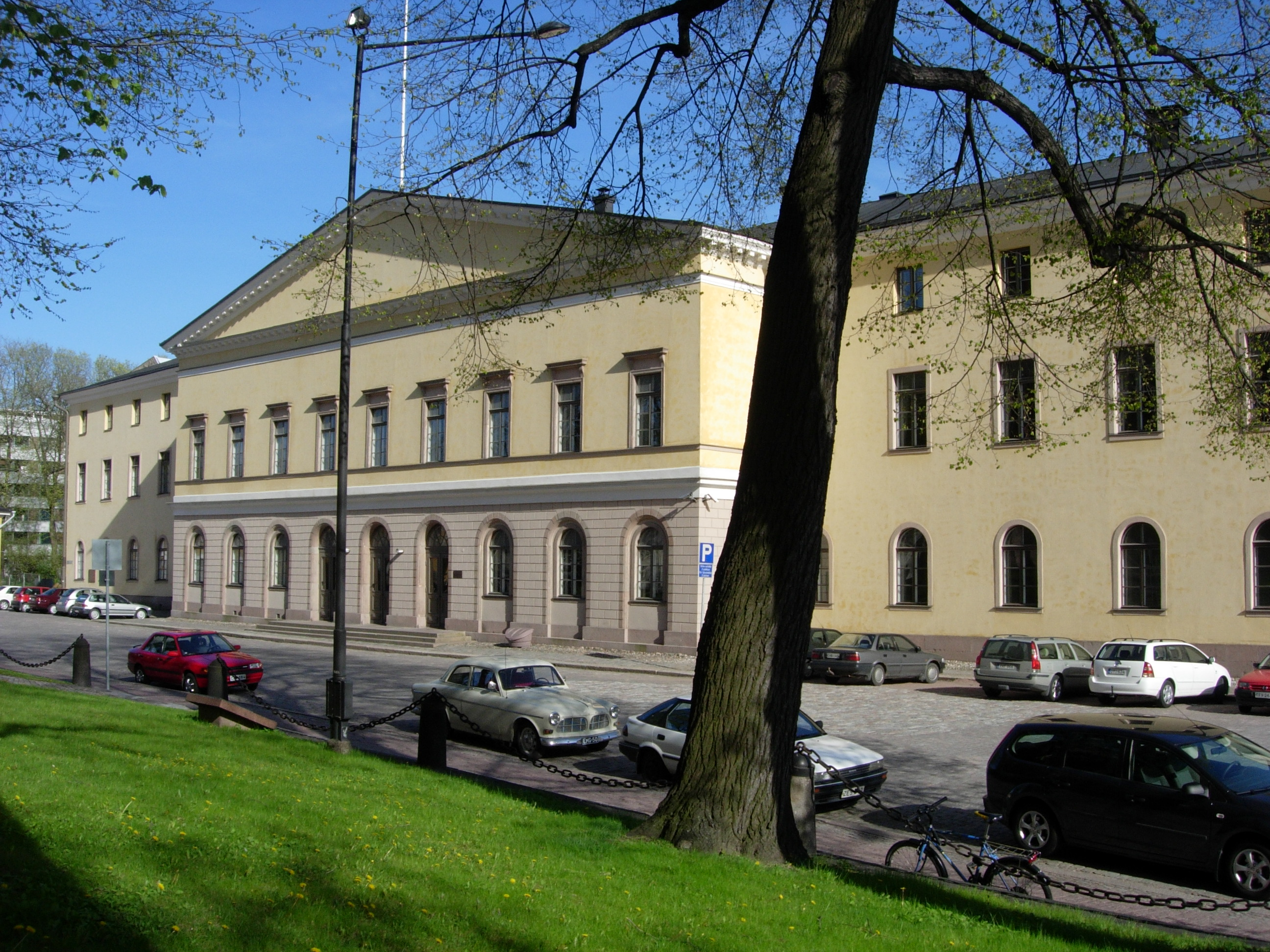 Akatemiantalo/Turun hovioikeus, Rothoviuksenkadun puolelta.